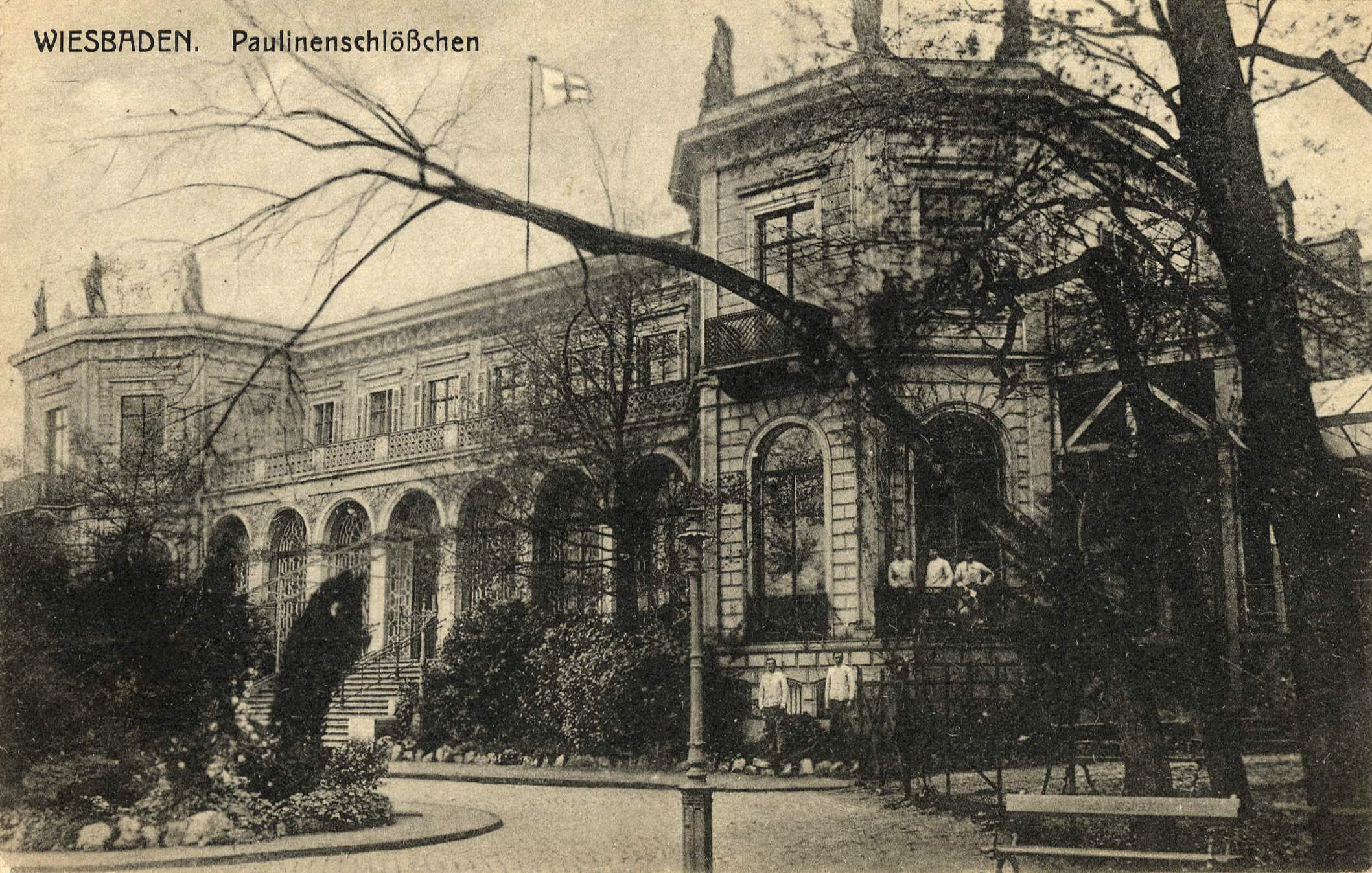 Paulinenschlößchen Wiesbaden. Gebaut 1841 als Witwensitz Pauline von Württemberg, Herzogin von Nassau, später verkauft, durch Bombenangriff schwer beschädigt, abgerissen, Grundstück dient heute als Parkplatz der hessischen Staatskanzlei.